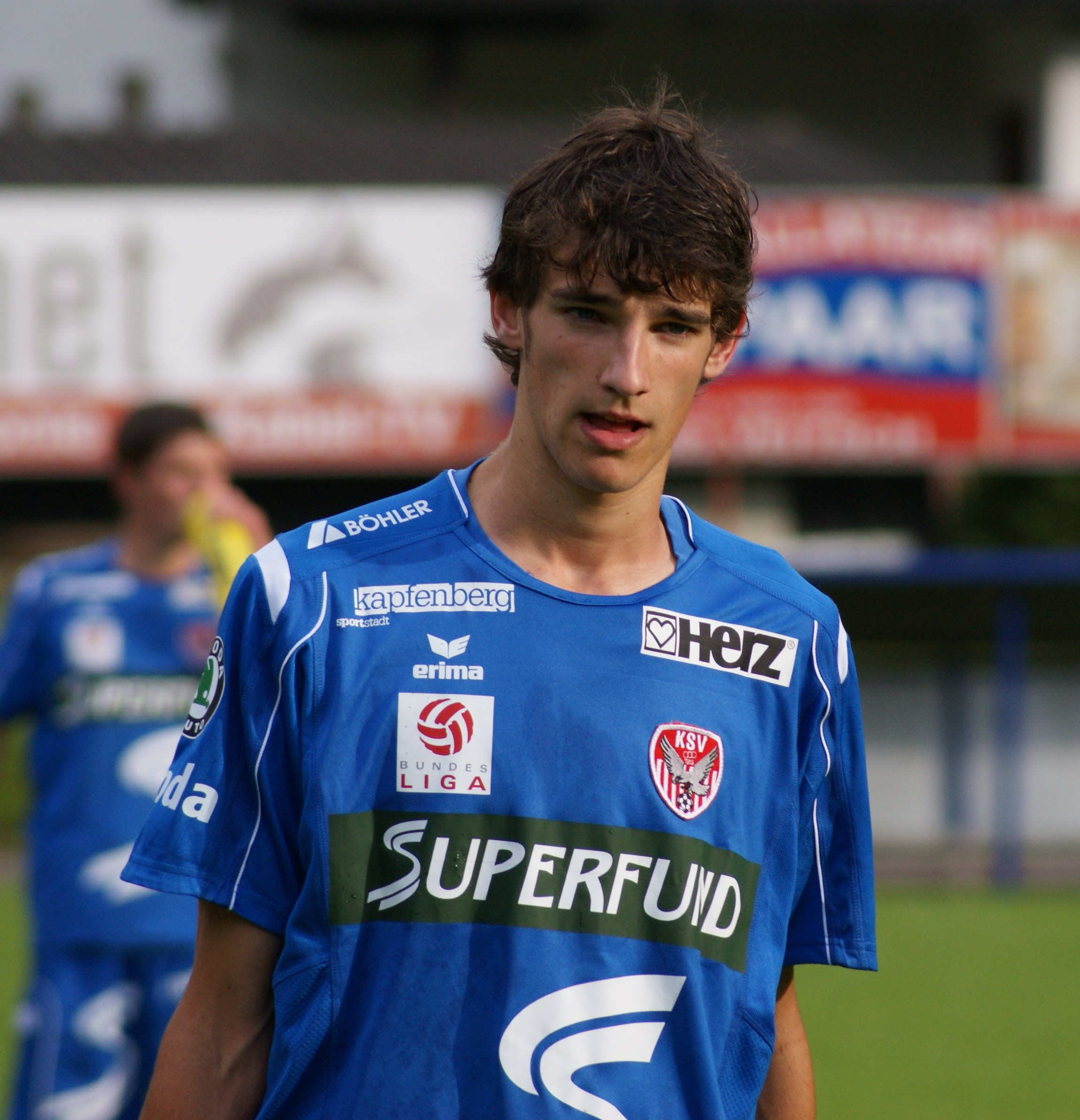 Philipp Wendler, Spieler der Kapfenberger SV